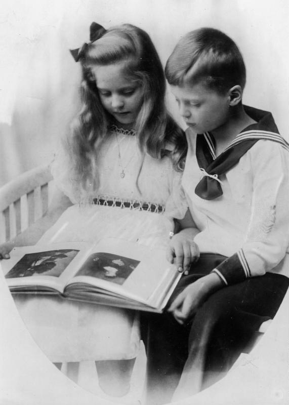 Kinder des Herzogs v. Sachsen-Coburg-Gotha Prinzessin Sybille u. Prinz Hubertus, Kinder des Herzogs v. Sachsen-Coburg-Gotha [Kinderporträt, Prinzessin Sibylle u. Prinz Hubertus, ein(en) Fotoalbum/Bildband anschauend] Abgebildete Personen: * Sachsen-Coburg und Gotha, Karl-Eduard von: 1884-1954, Herzog, Präsident des Deutschen Roten Kreuzes, Deutschland